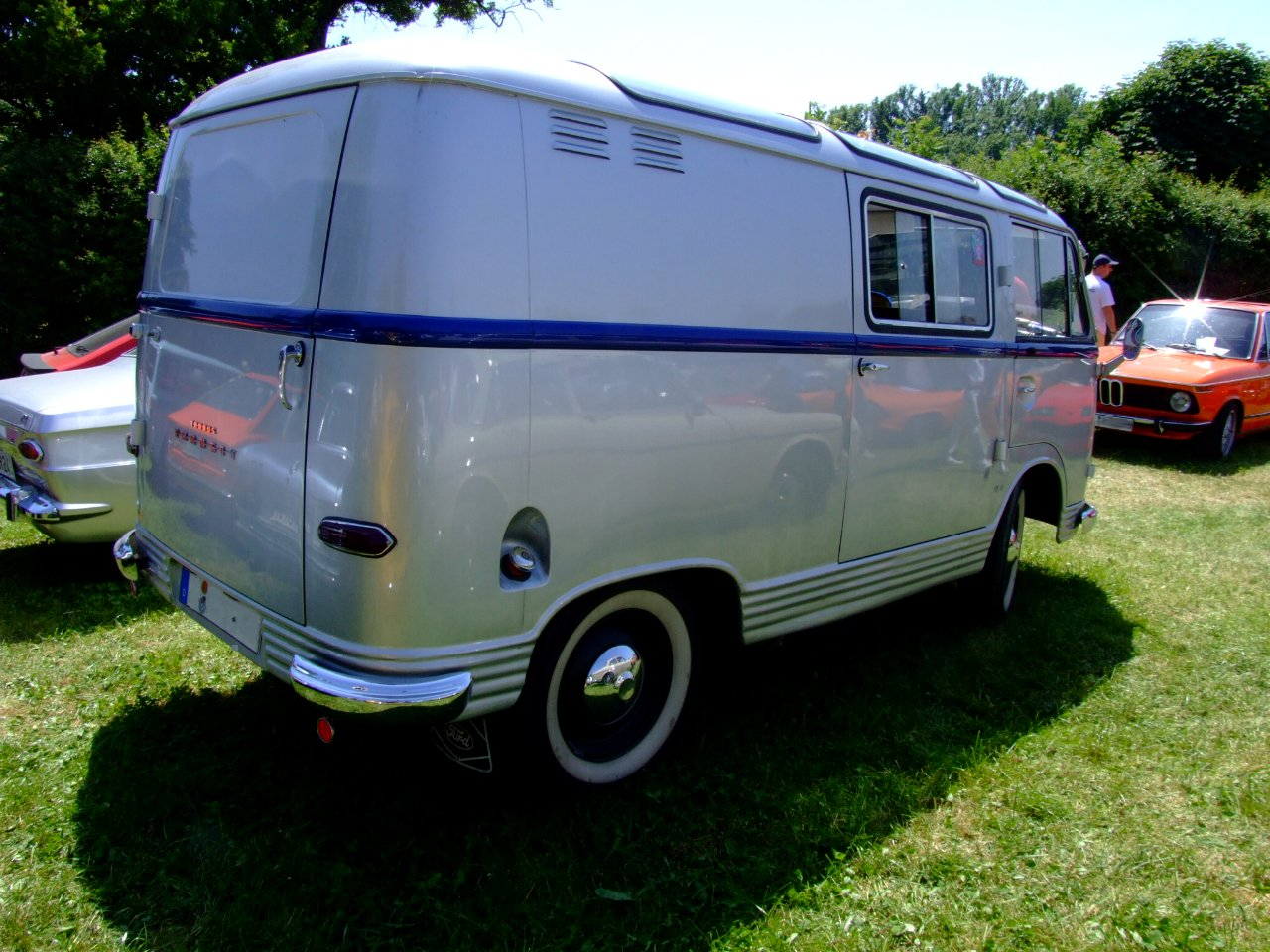 Ford Taunus Transit Bj.: 1964 55 PS mit Ford 20M-Maschine